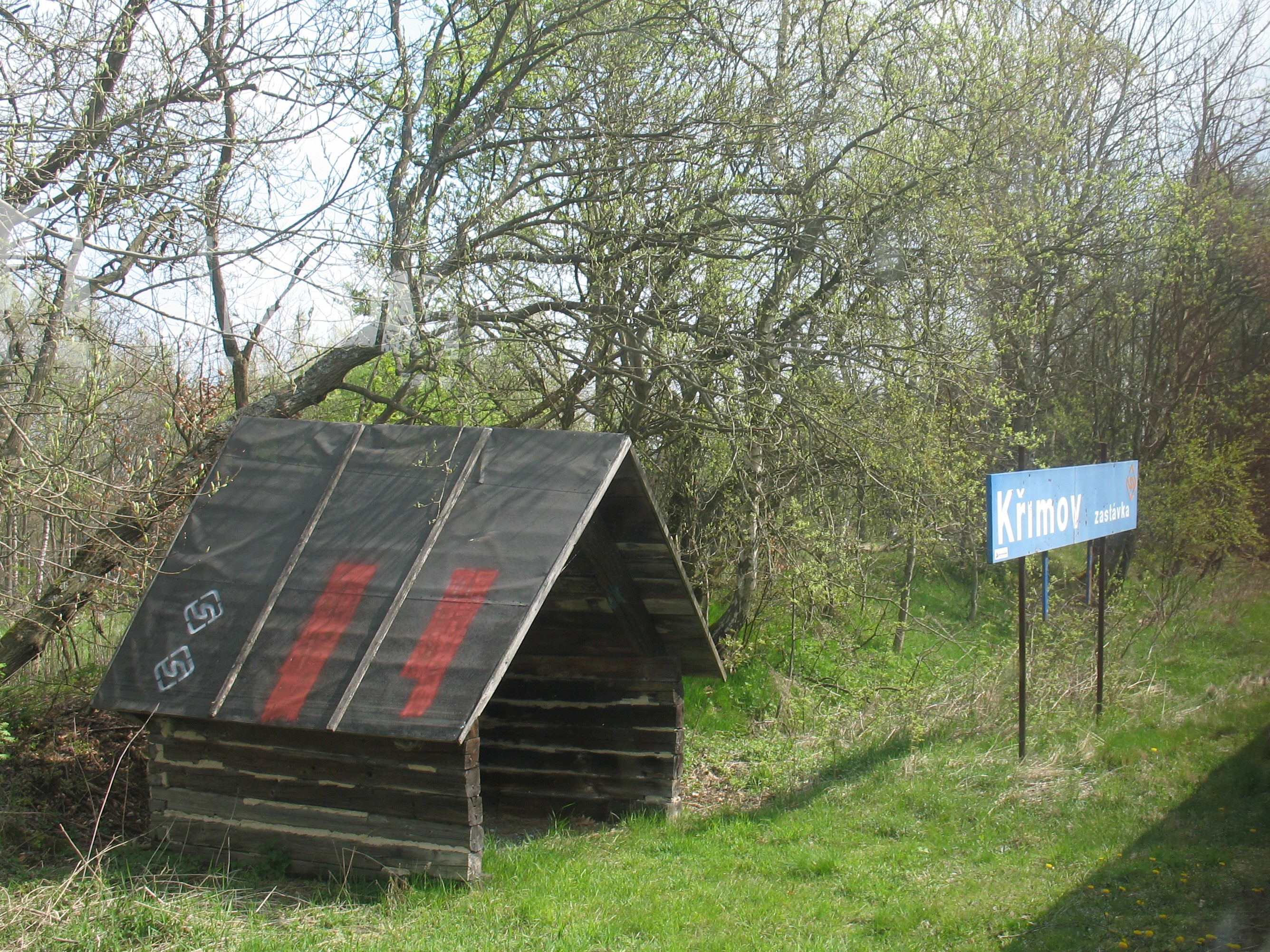 "Čekárna" u zastávky Křimov